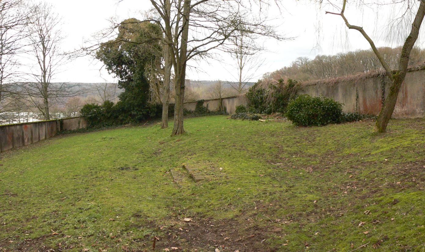 Neuer Jüdischer Friedhof (Münden) innen